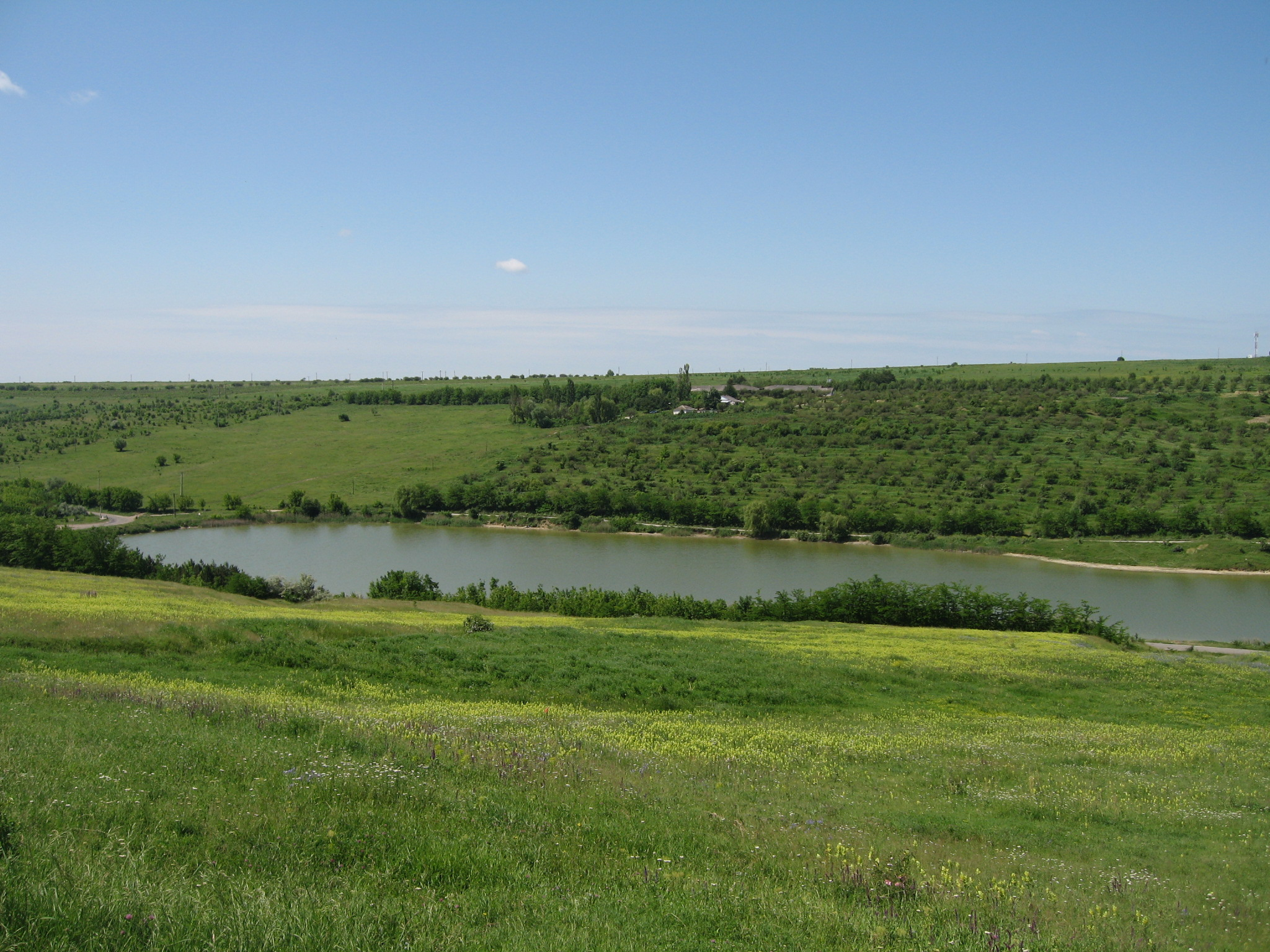 Barajul Aroneanu